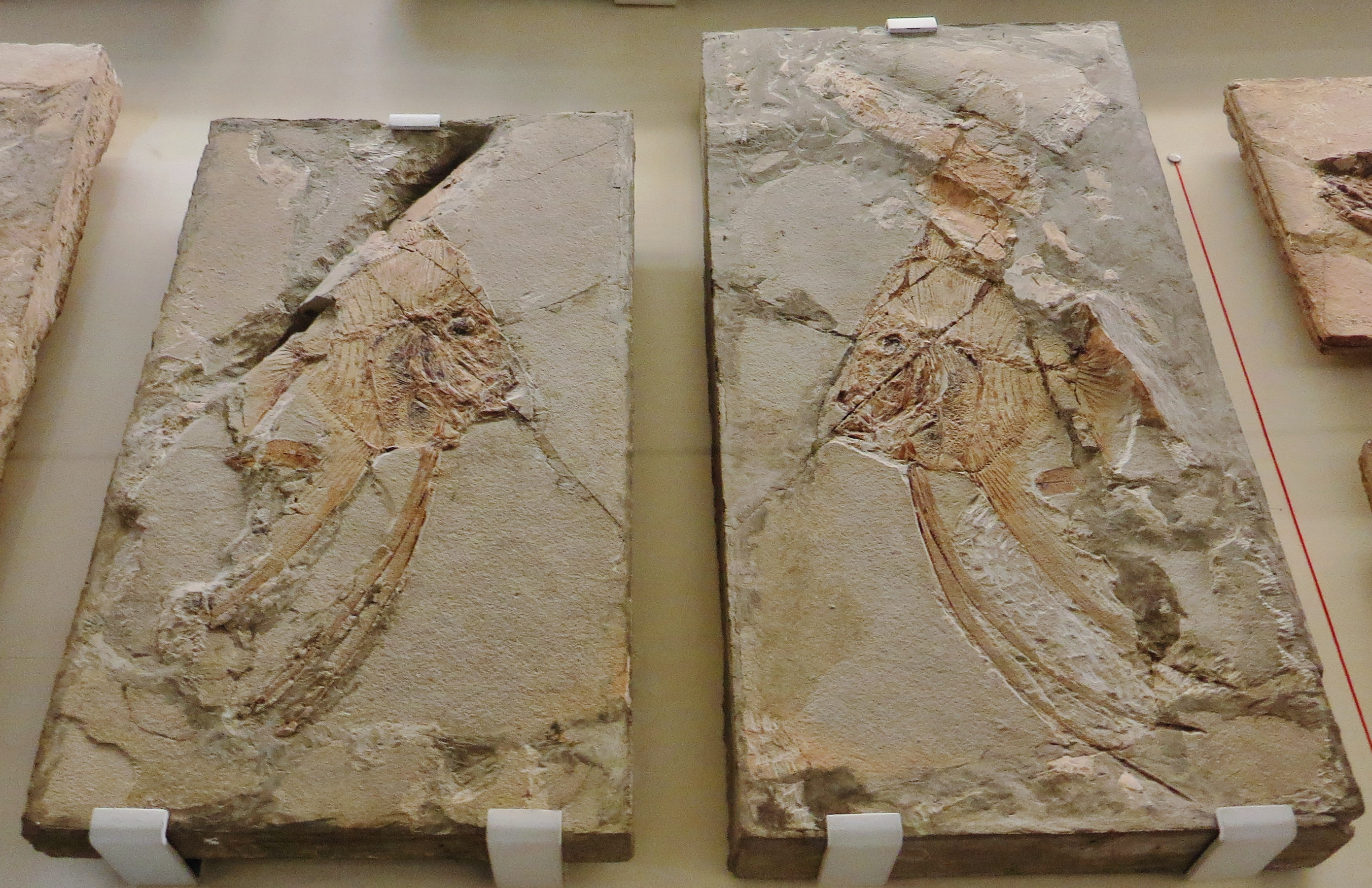 Fossil - Took the picture at Museo di storia naturale di Verona